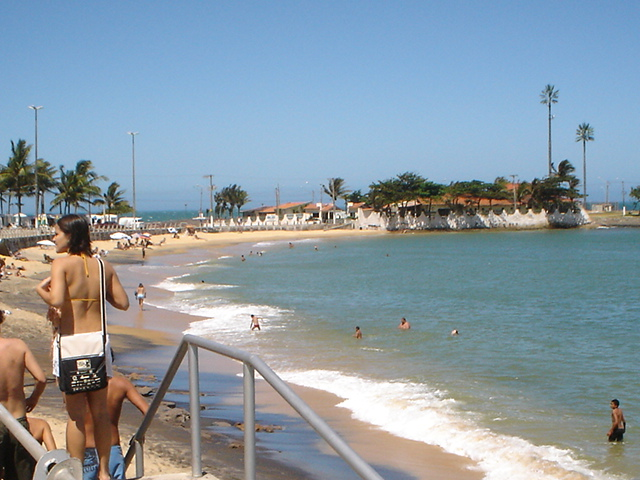 Guarapari, Brasil